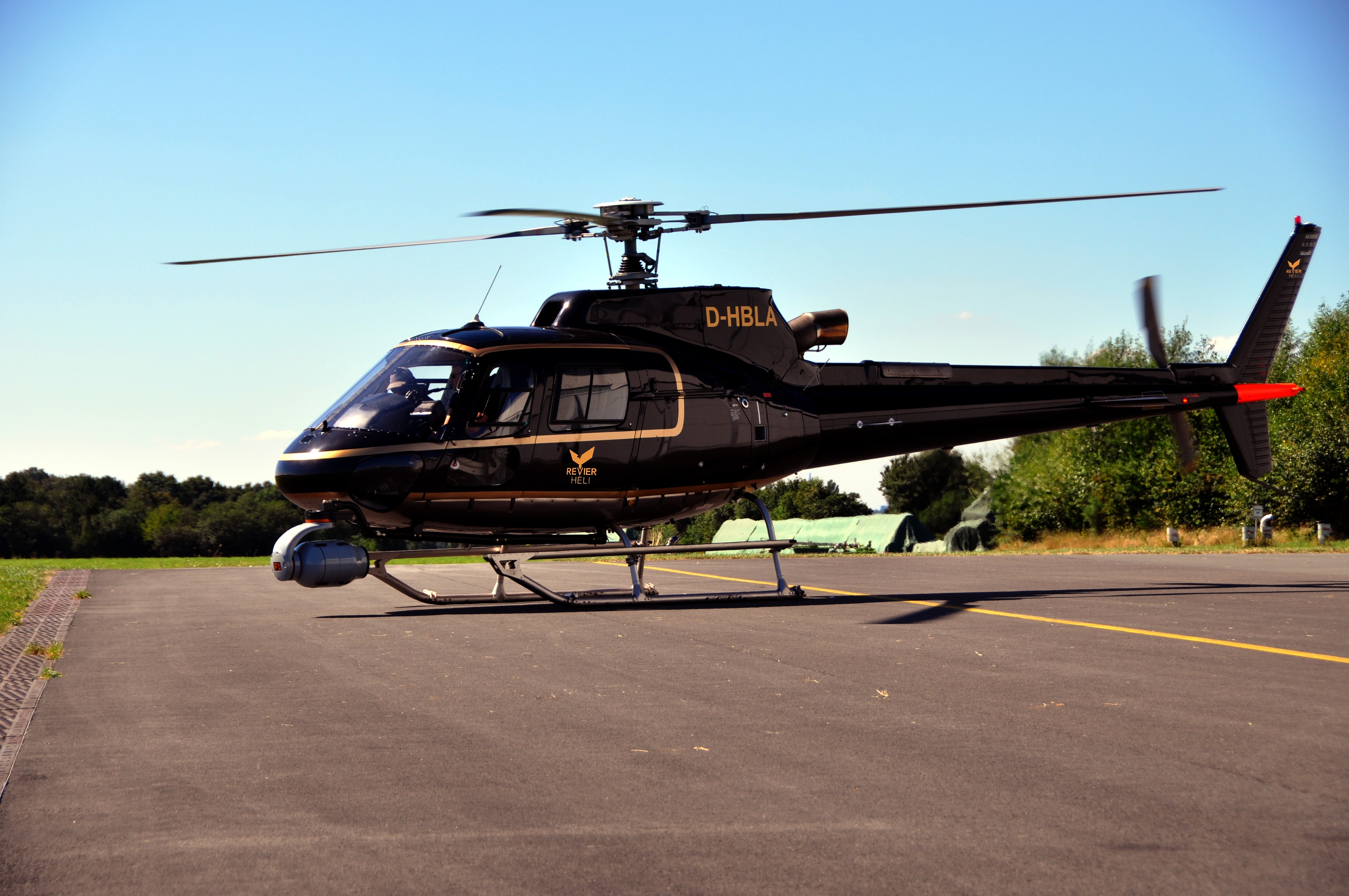 Ausgleichsgewicht für Kamerasystem am Hubschrauber der Firma Revierheli